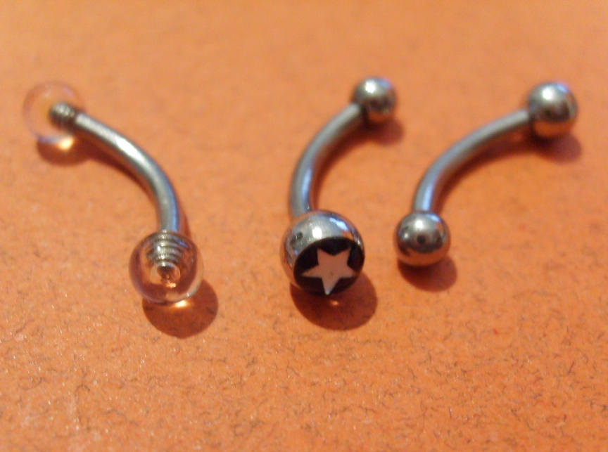 banana-bells